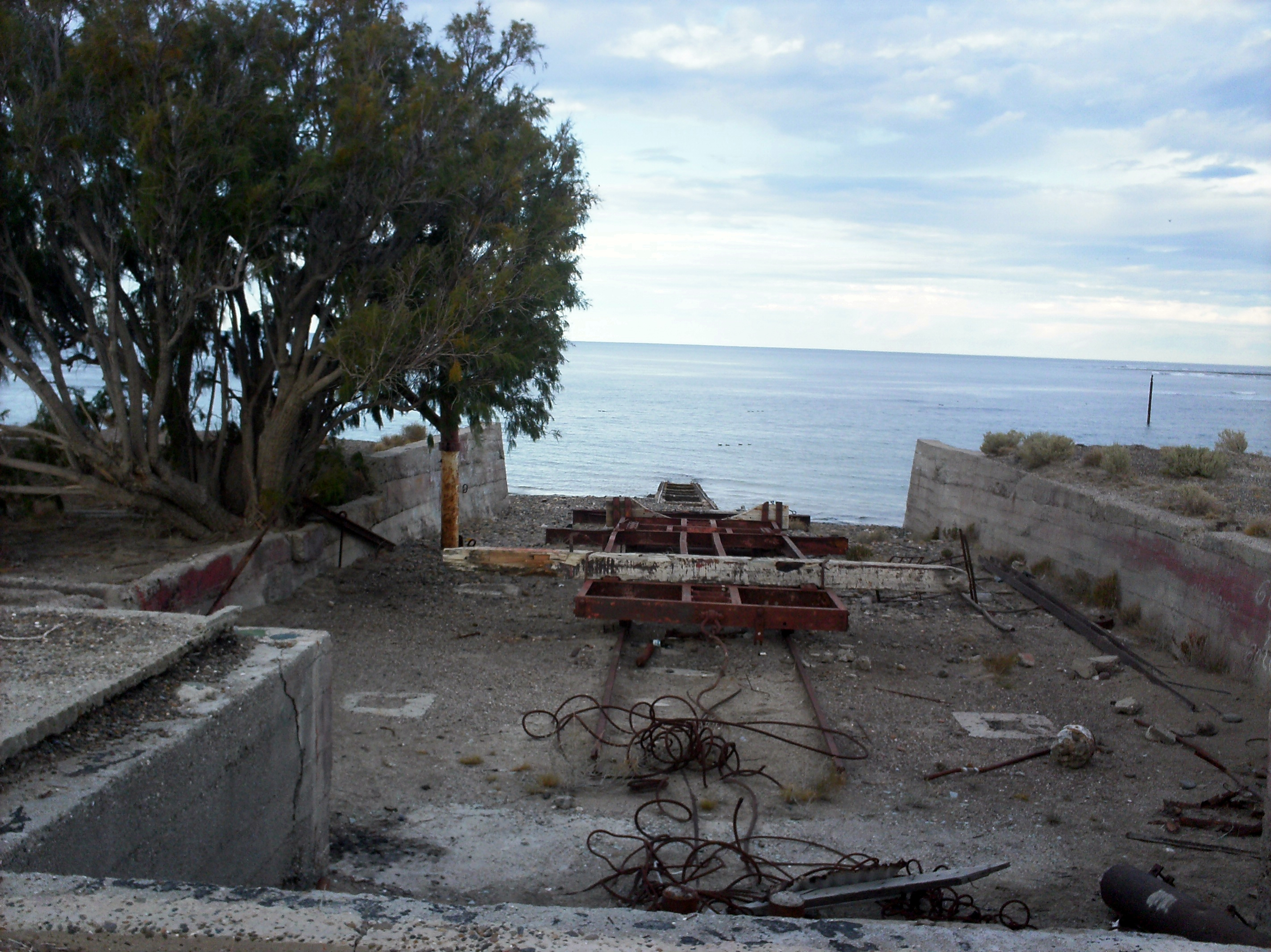 restos del antiguo embarcadero aún en pie en algunos sectores